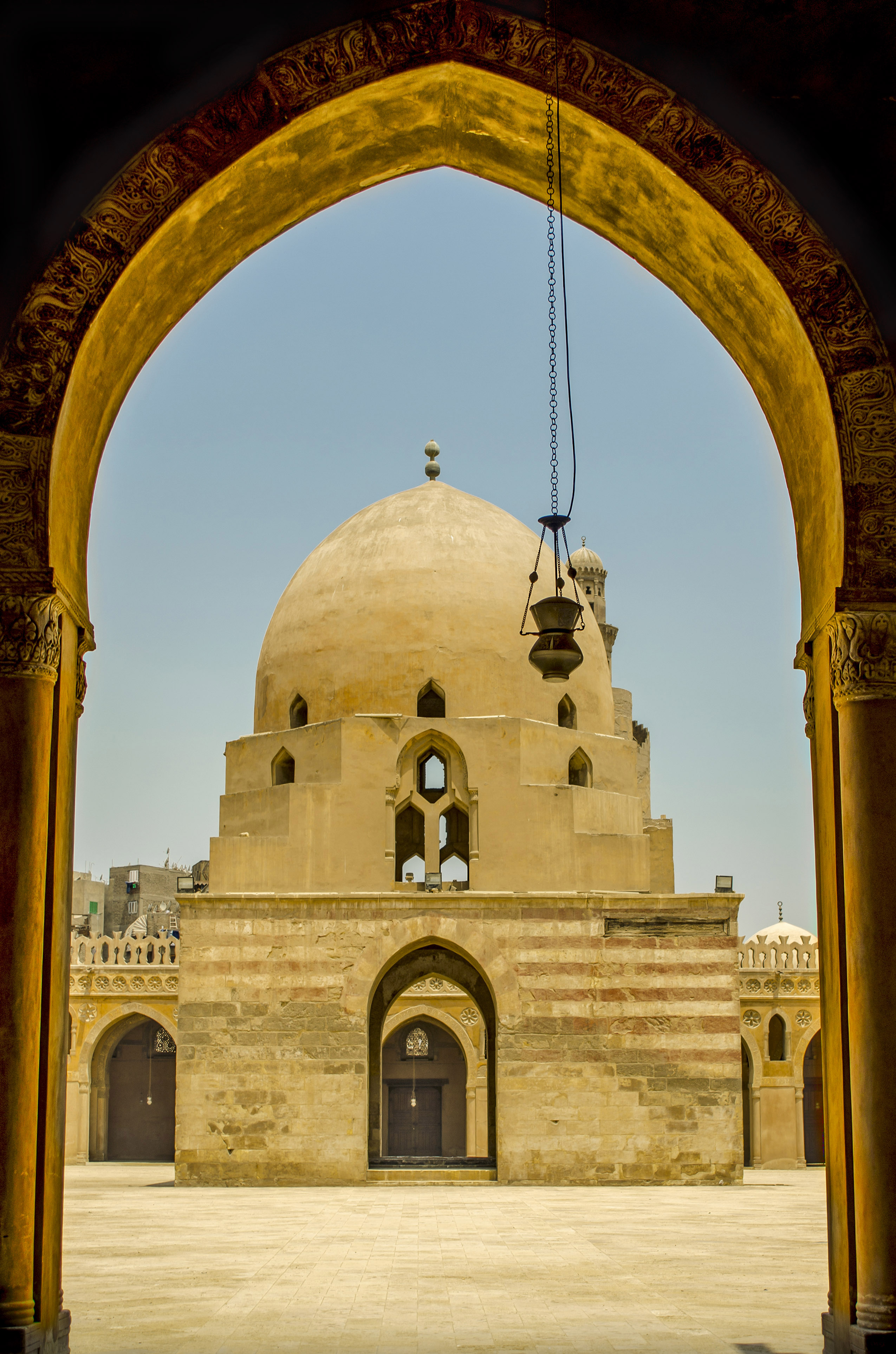 مصرى: من داخل مسجد أحمد بن طولون